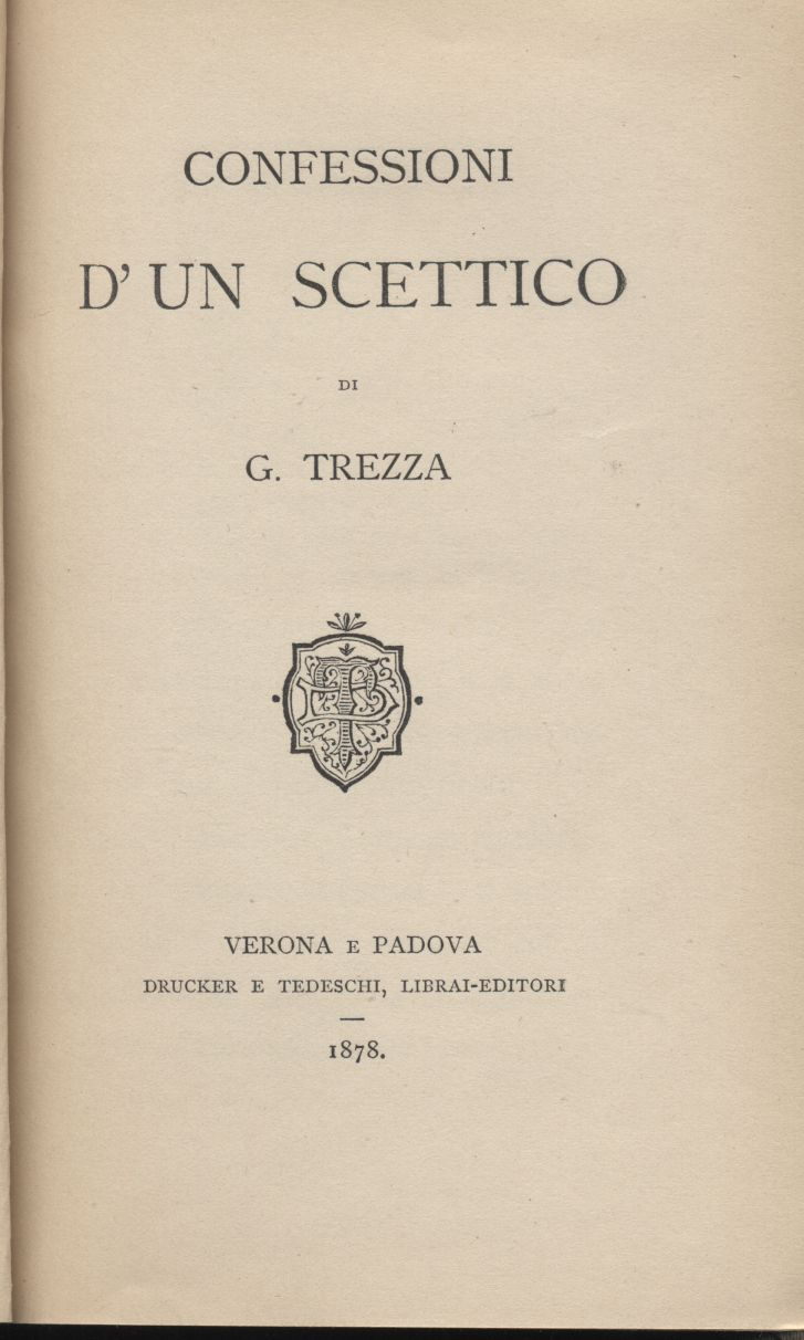 Collezione F. P. Frontini